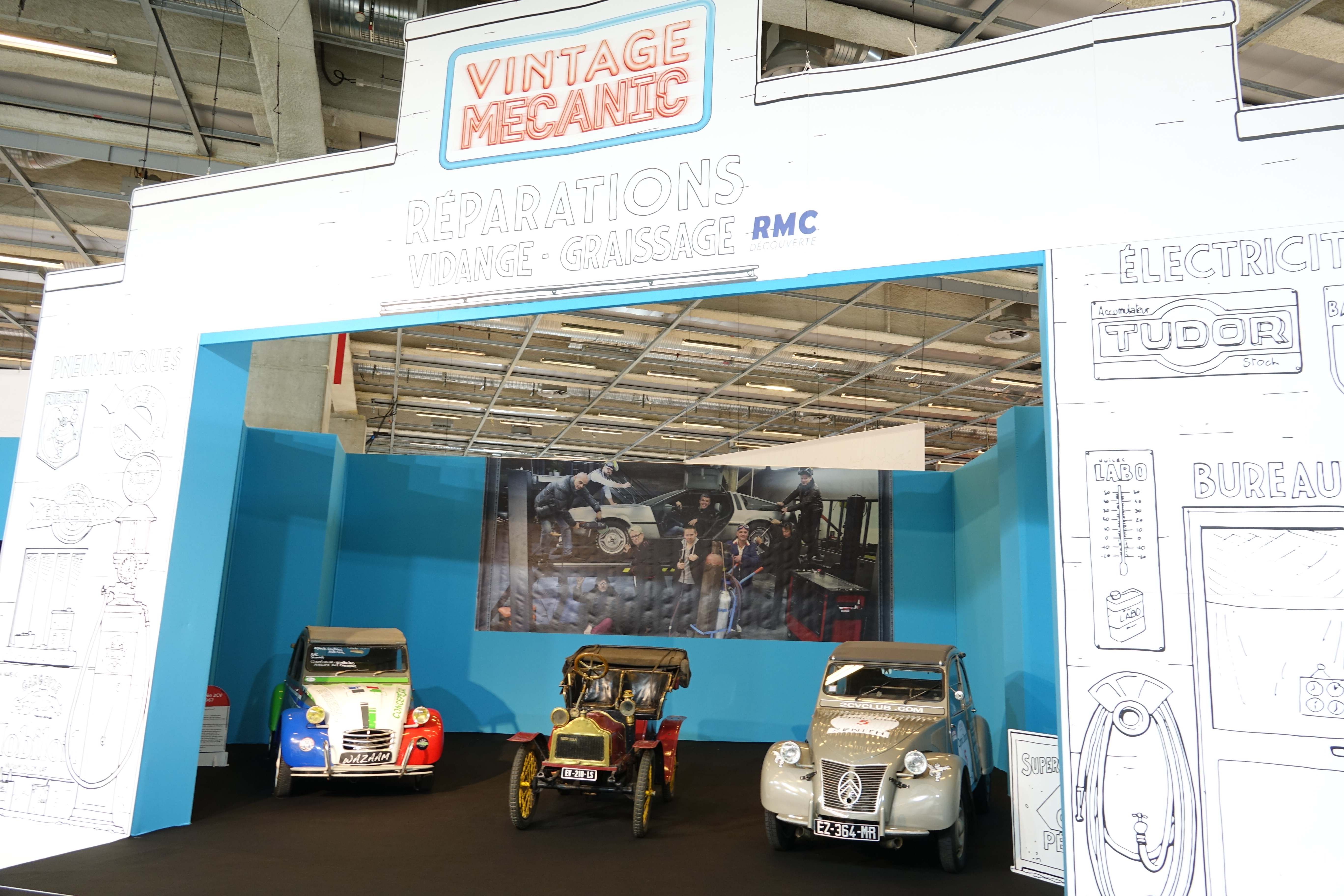 New Axa et deux Citroën 2CV, Les Routes mythiques au Mondial Paris 2018